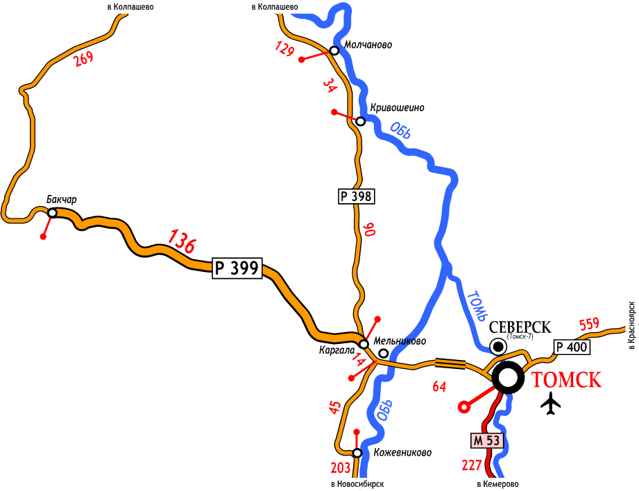 Map of road R399 in Russia, Kargala—Bakchar; RU: Карта дороги Р399 в Томской области, Каргала—Бакчар